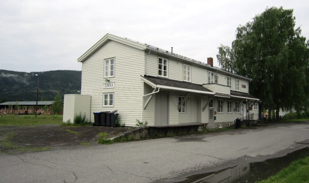 Dokka stasjon på Valdresbanen